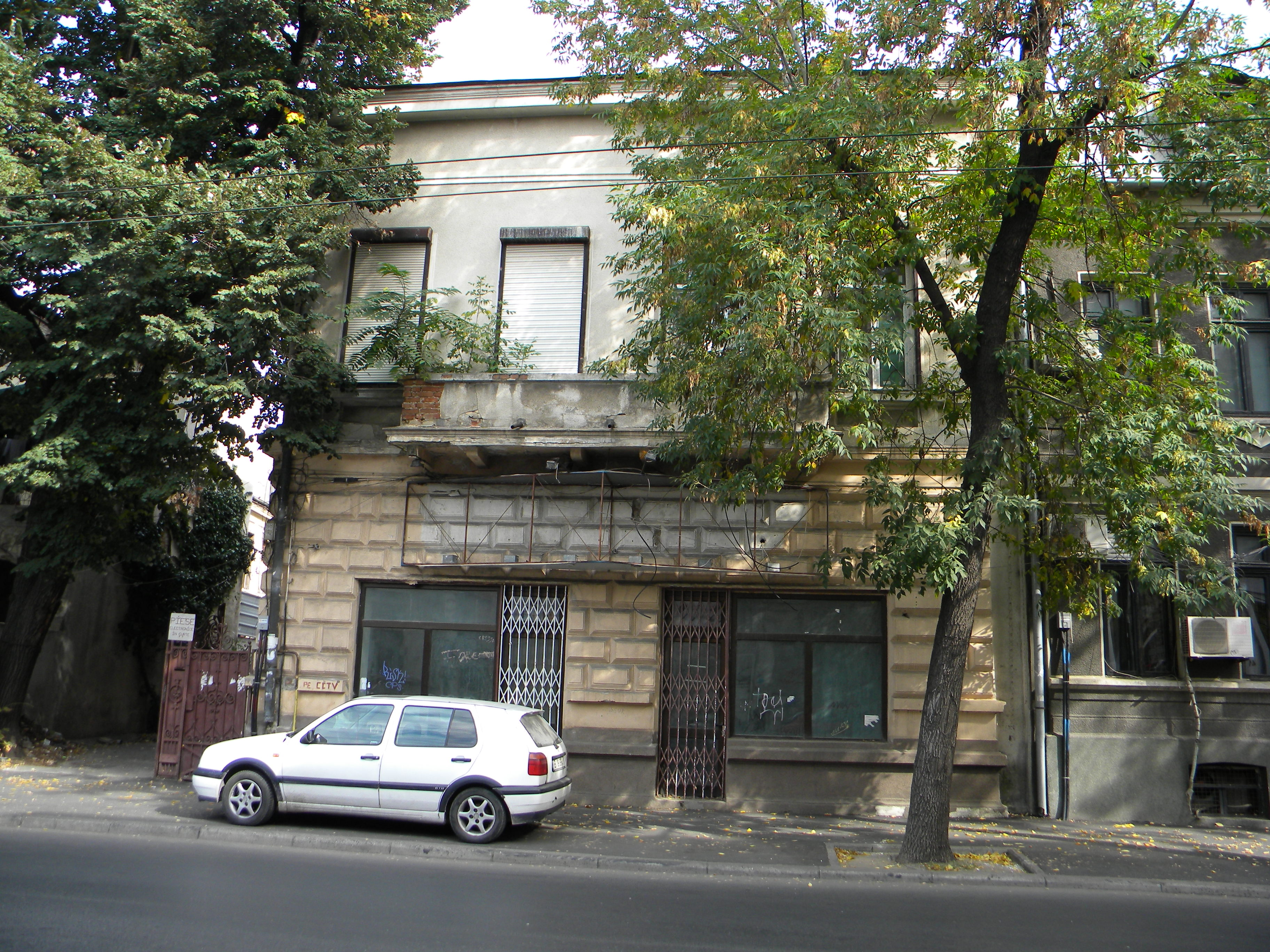 Bucuresti, Romania, Casa pe Calea Grivitei nr. 34, sect. 1